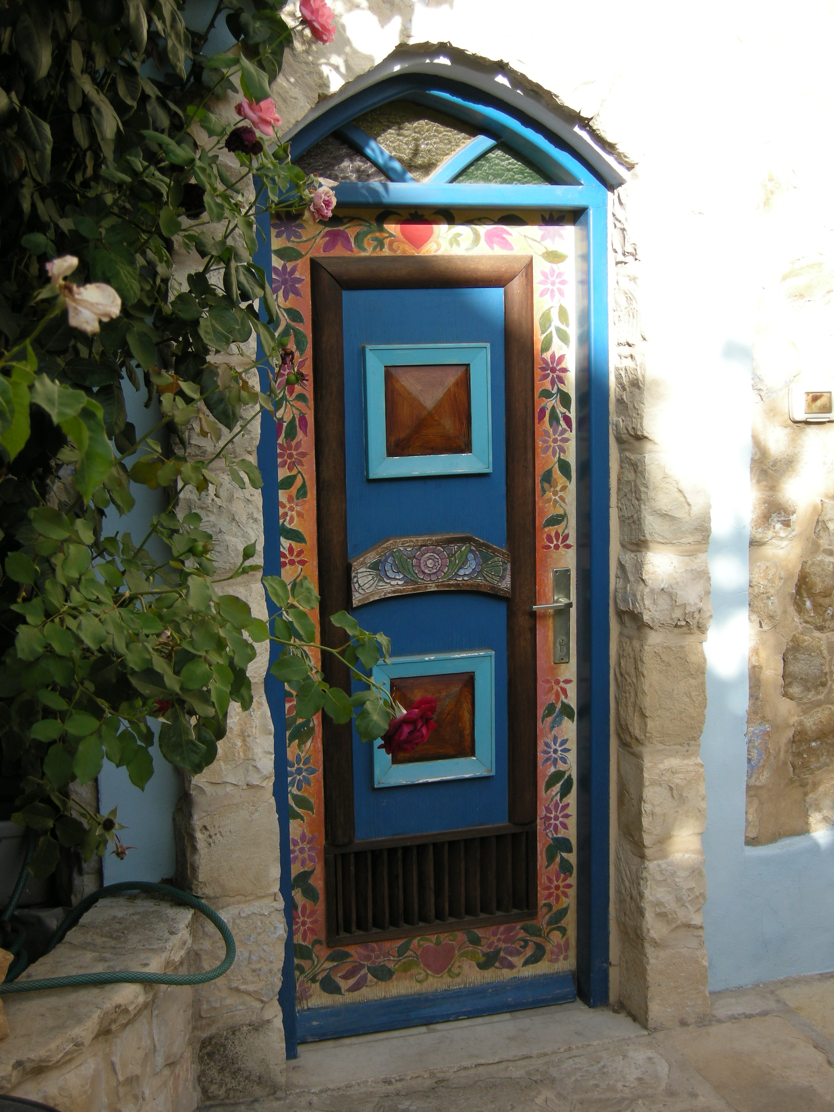 Safed